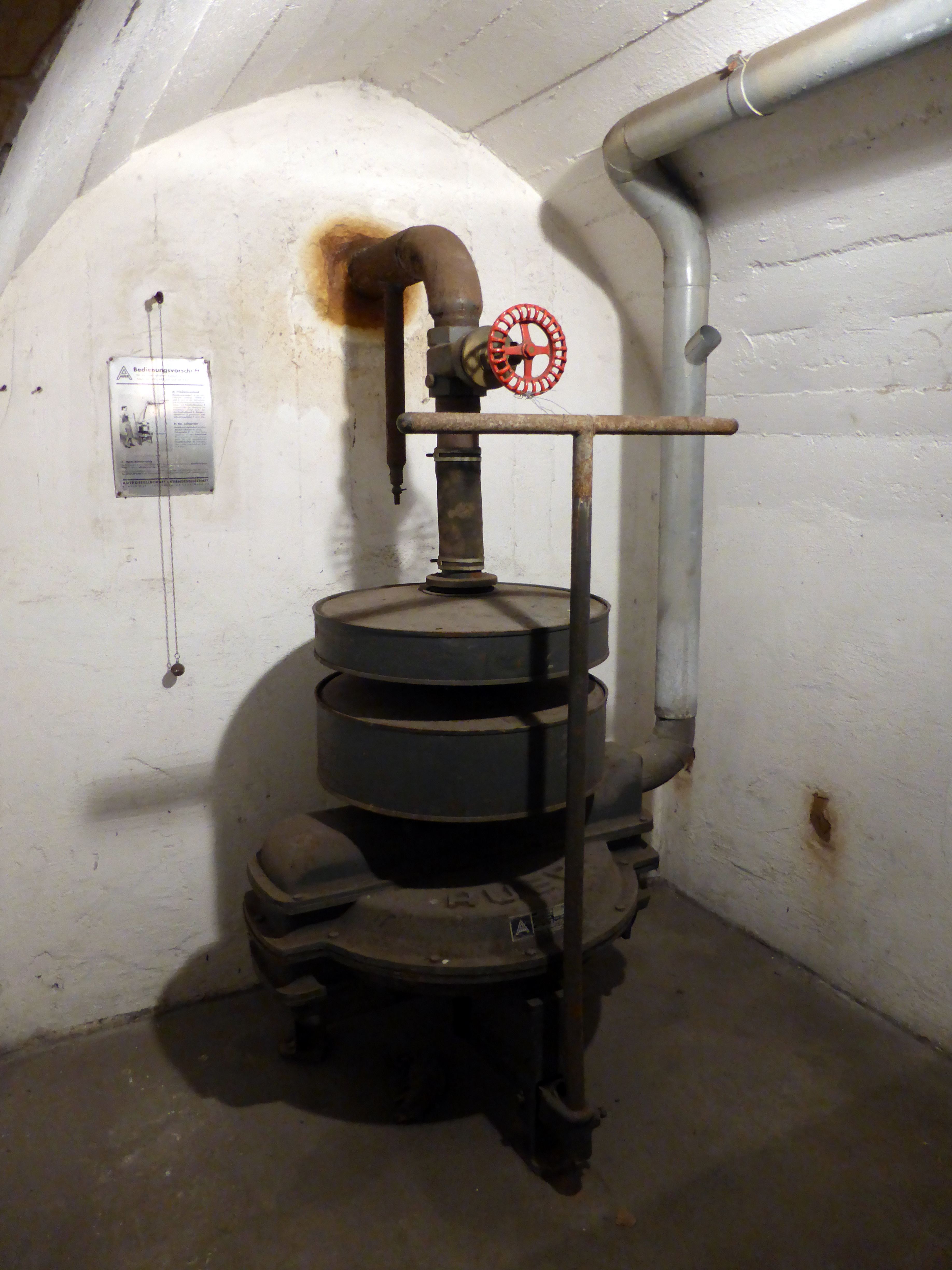 Röhrenbunker Oberlandesgericht Köln, unter dem Reichenspergerplatz.